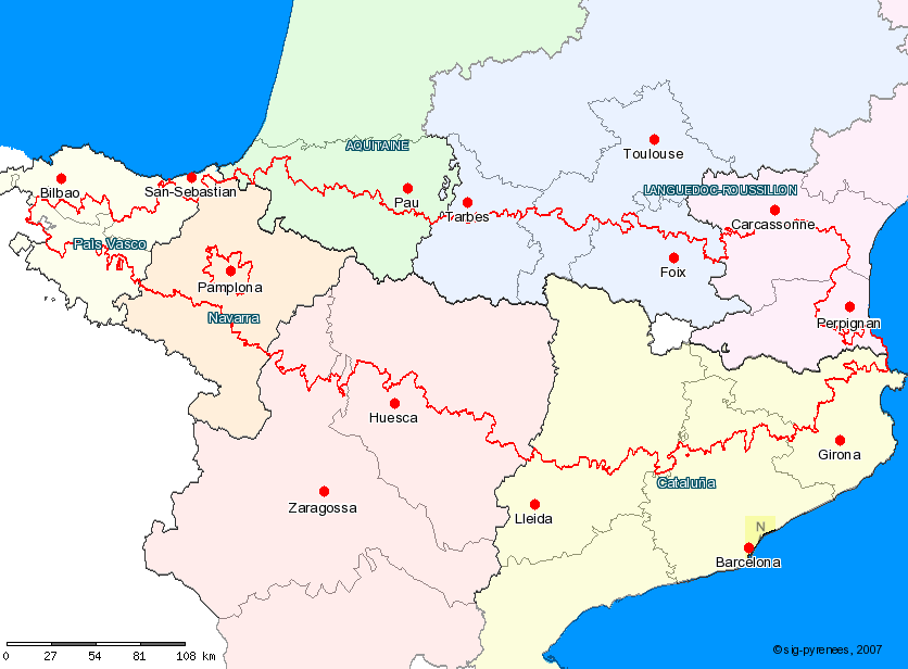 Carte des limites administratives du massif Pyrénéen, issue de la loi de massif de 1985.